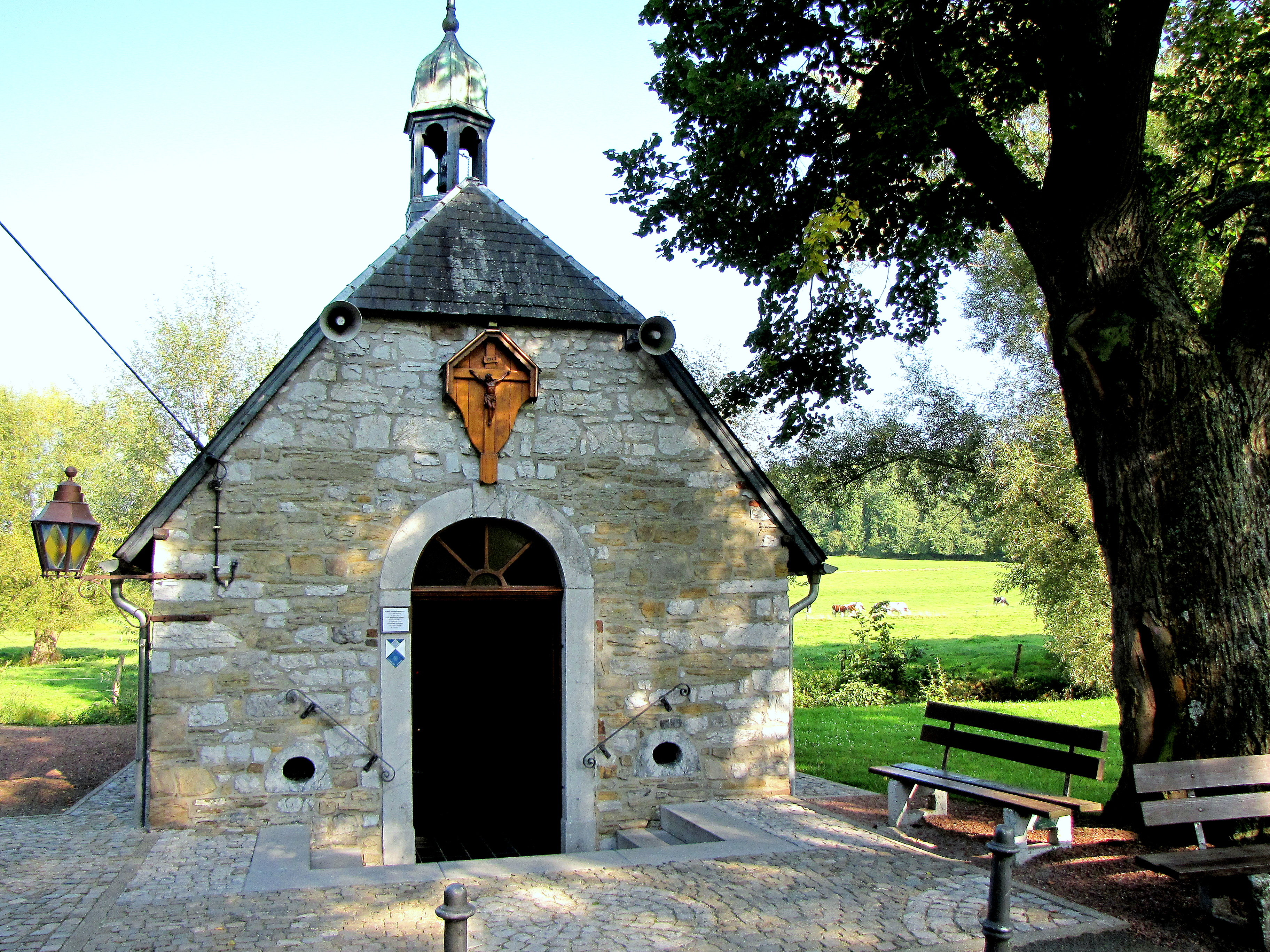 La Calamine - Chapelle St Roch